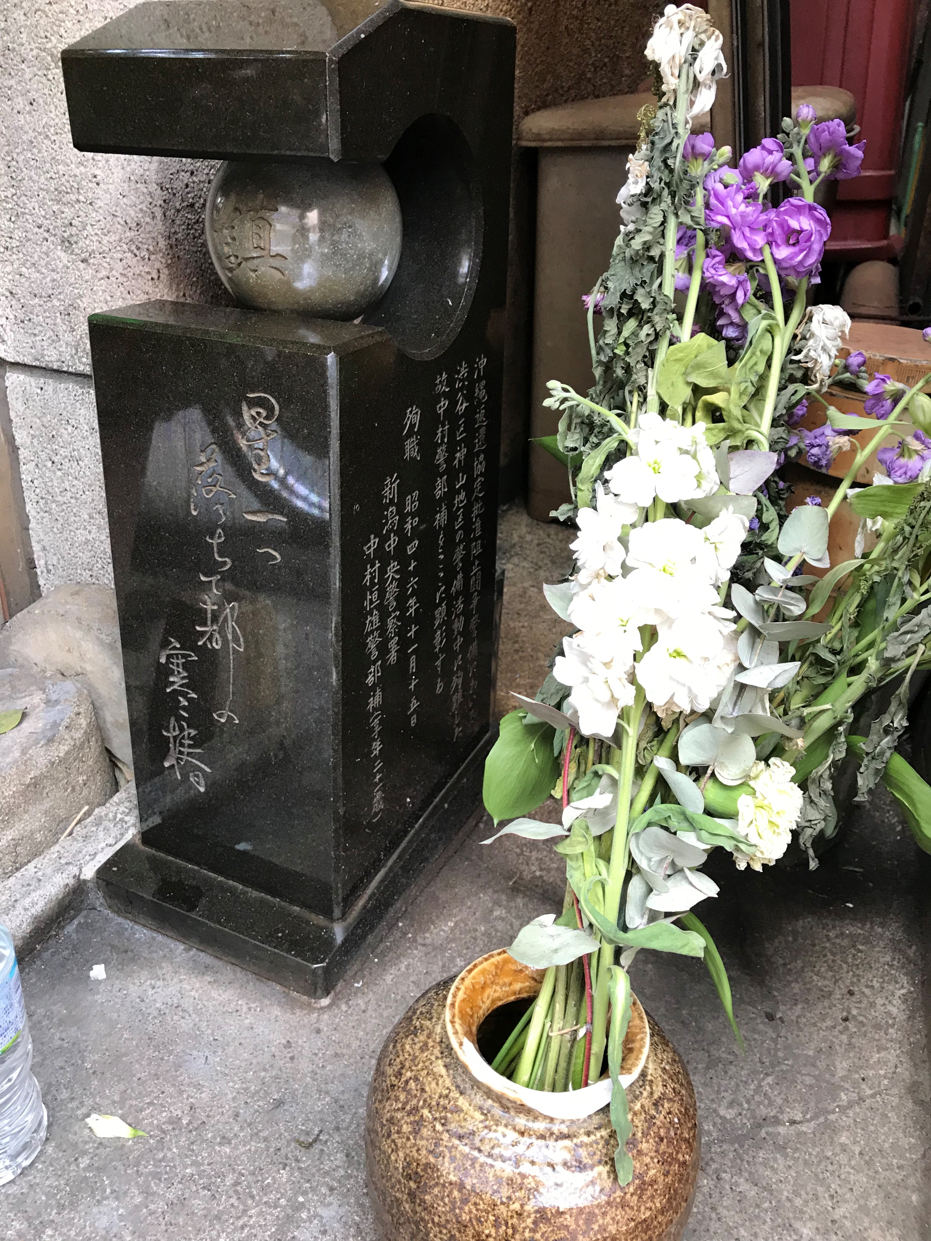 2018年現在も献花が絶えない、事件現場にある慰霊碑